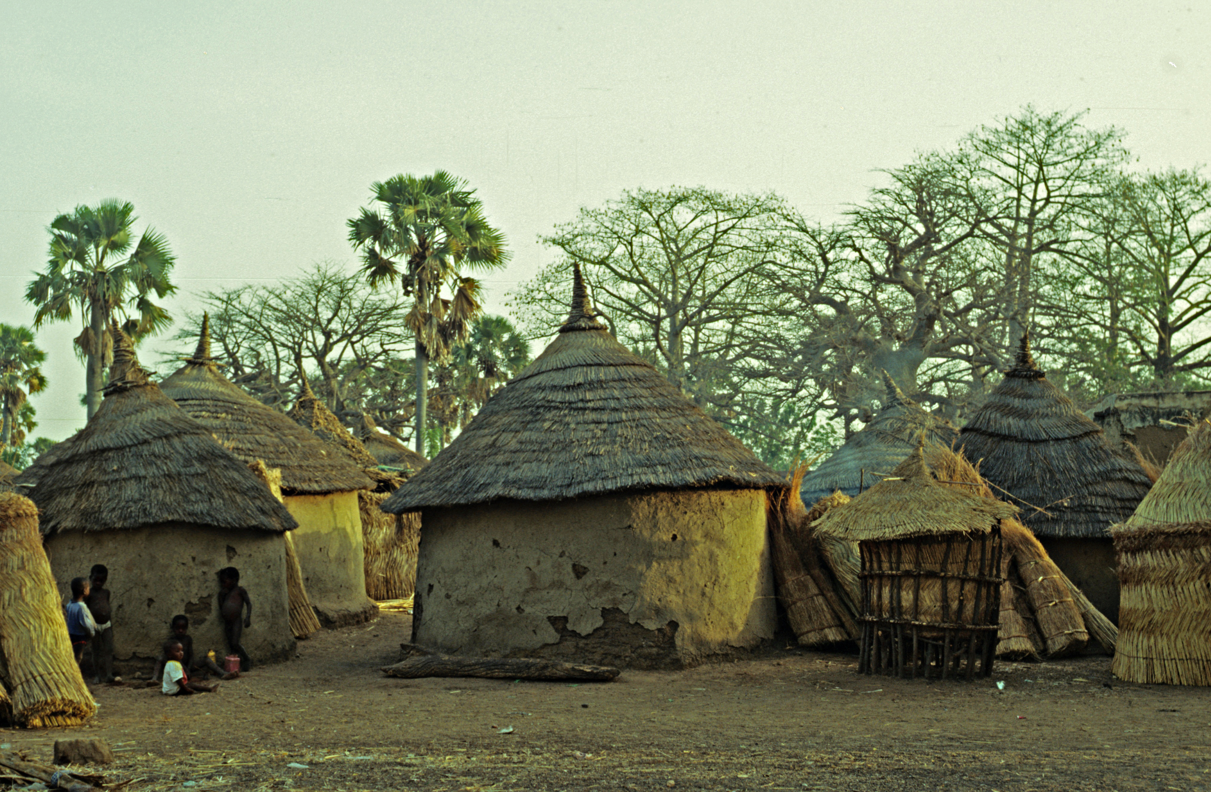 Burkina Faso: Traditionelle Rundhütten in Dourtenga